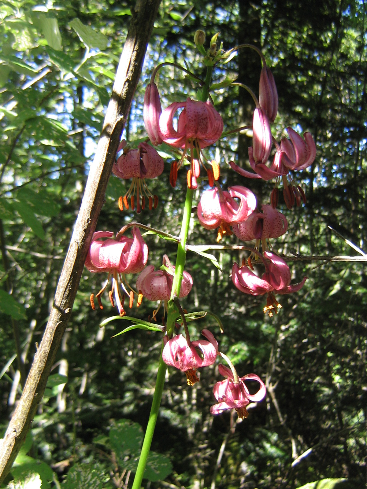 Lilium martagon